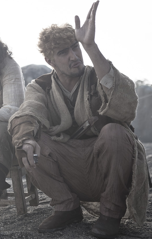 Renato Góes em cena do longa-metragem "Por Trás Do Céu".